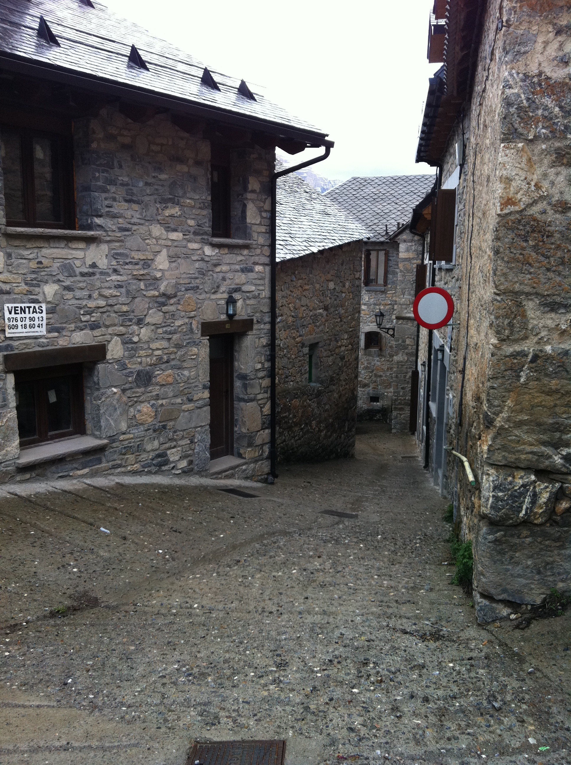 @antoniolana